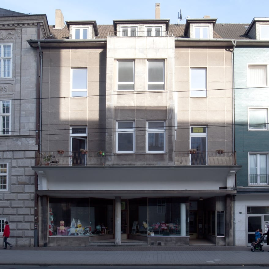 Strassenansicht